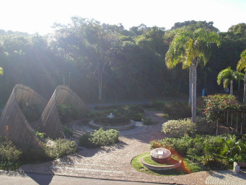 Jardim das plantas nativas de Curitiba. Localizado dentro do Jardim Botânico de Curitiba, PR, Sul do Brasil.